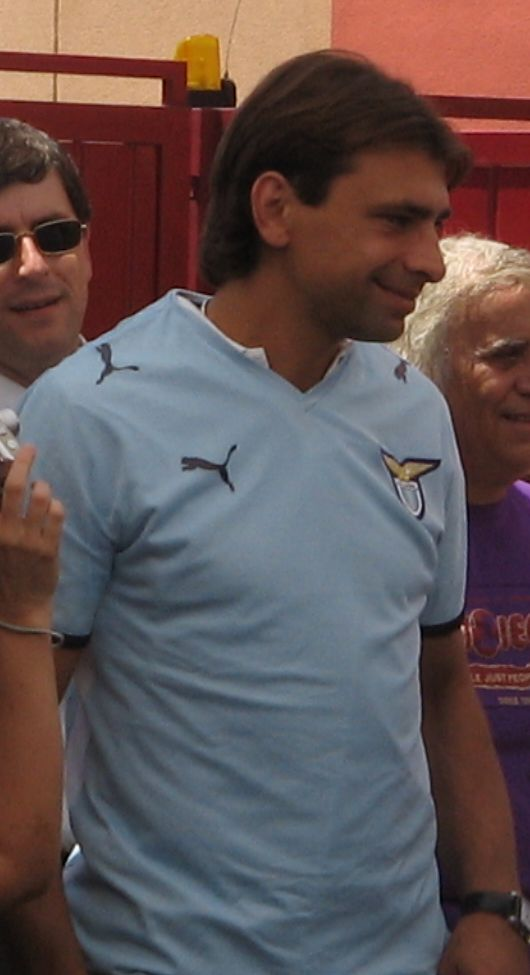 Sebastiano Siviglia alla presentazione delle maglie della Lazio 2008/2009